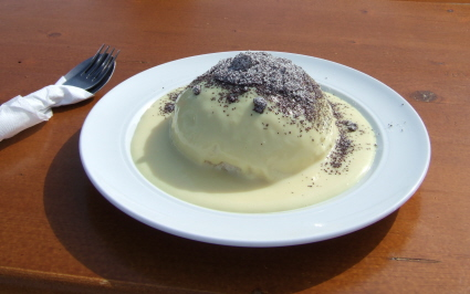 Germknoedel